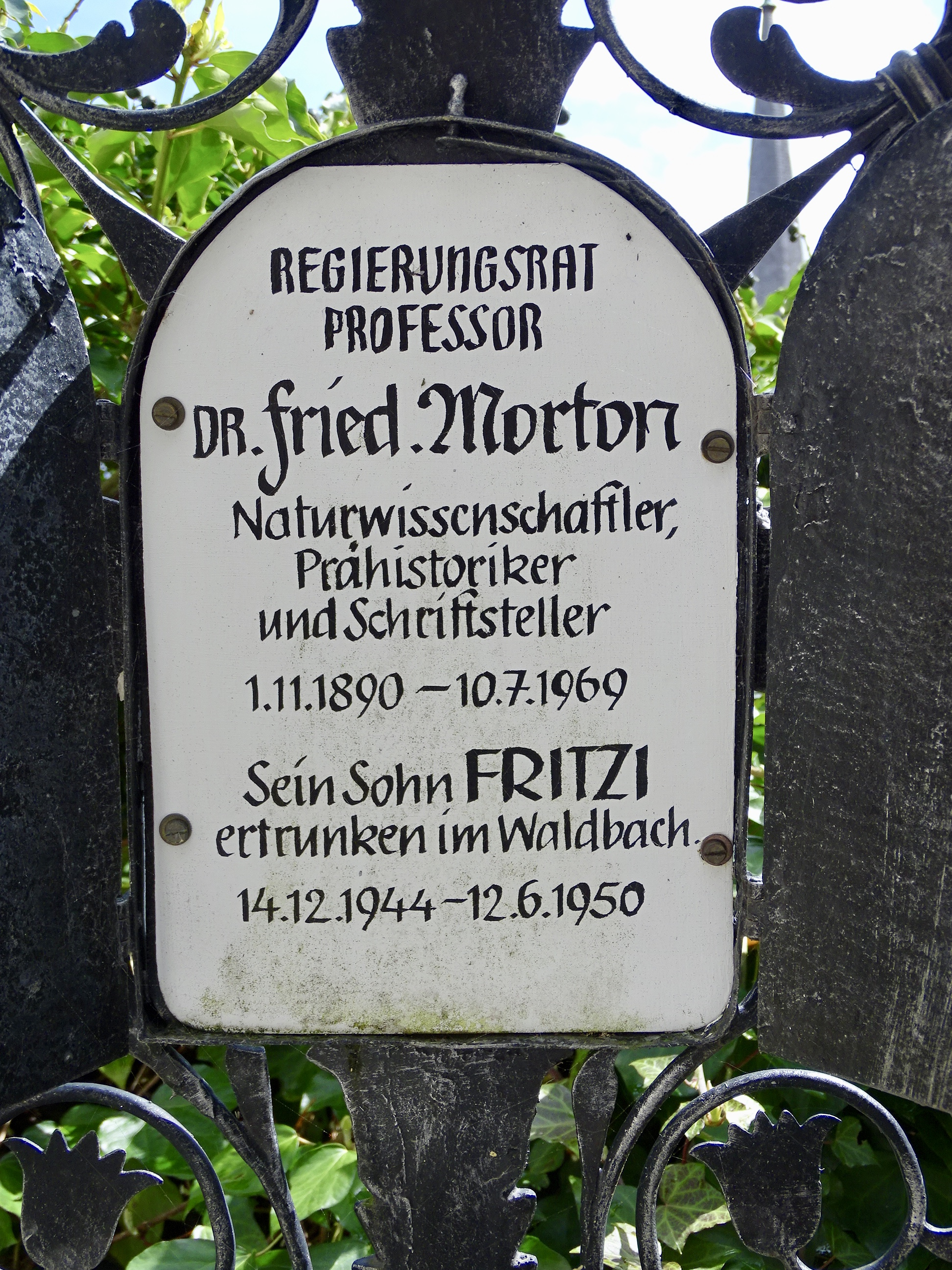 Grabinschrift von Prof. Dr. Friedrich Morton